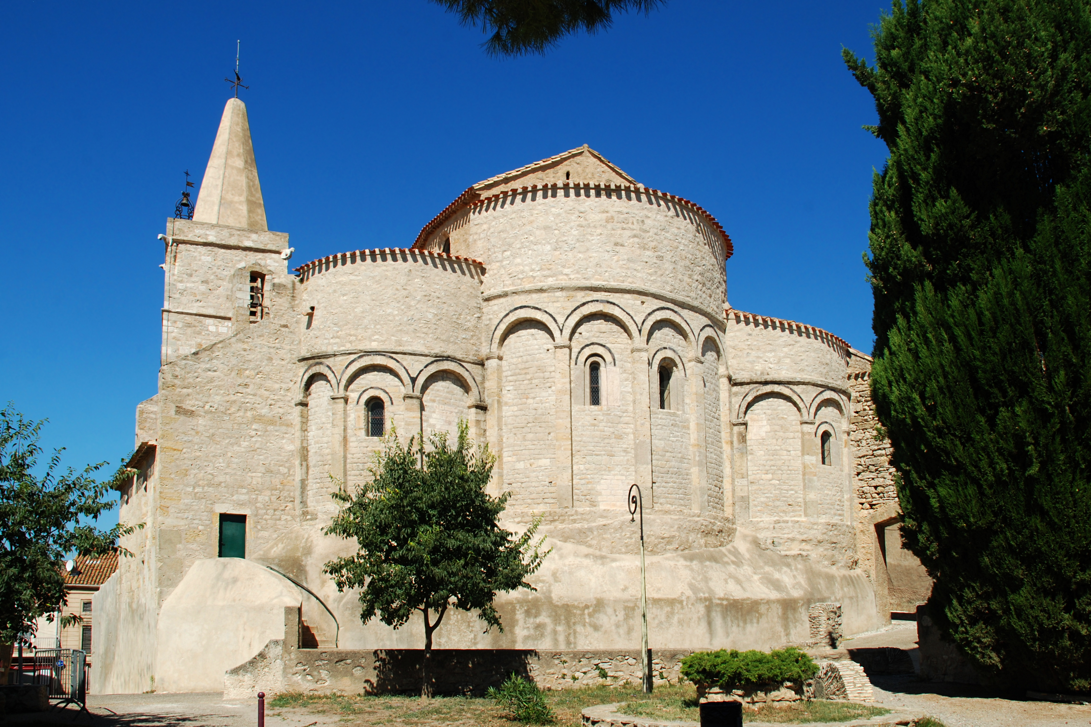 France - Languedoc - Aude - Église Saint-Jean l’Évangéliste d'Ouveillan